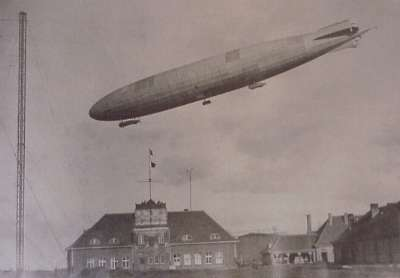 L 30 over Strassers hovedkvarter i Ahlhorn